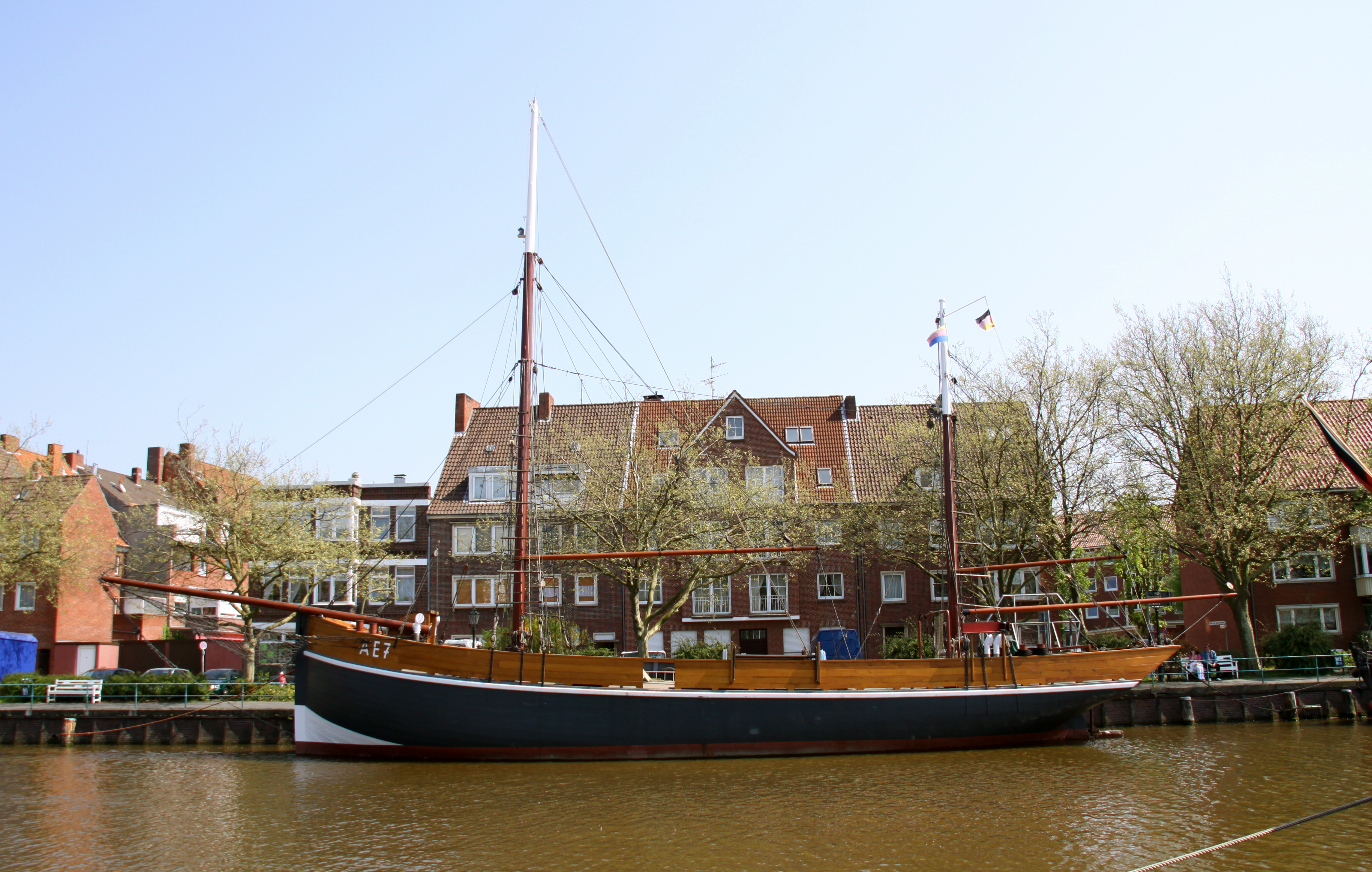 Seit dem Frühjahr 1995 liegt der Logger AE 7 Stadt Emden als Museumsschiff im Emder Ratsdelft.